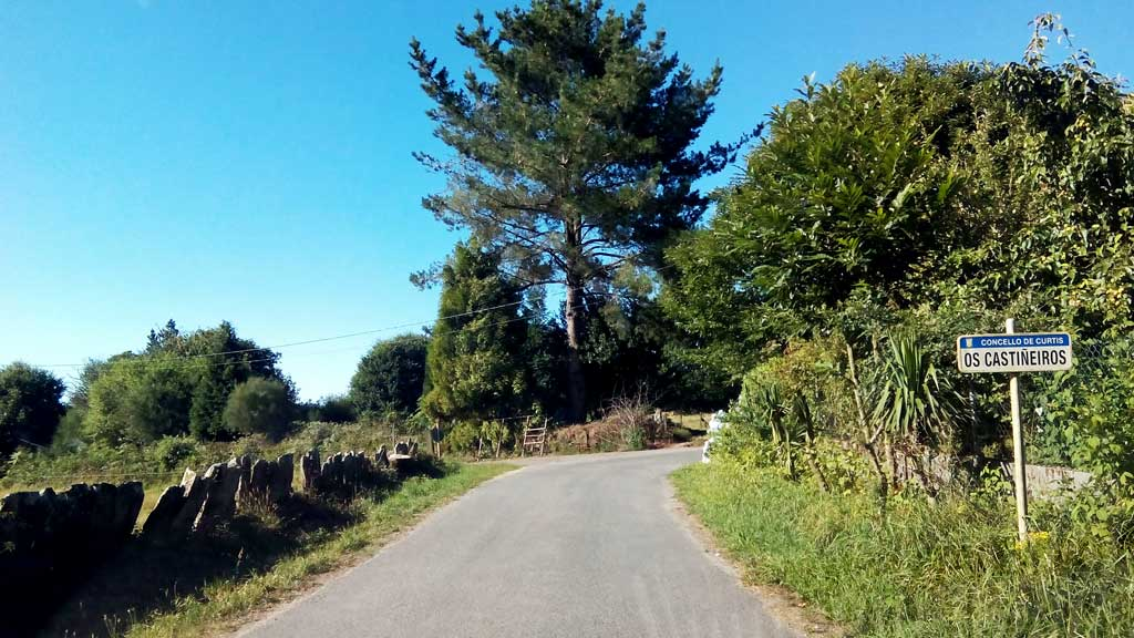 Vista dos Castiñeiros, Curtis.